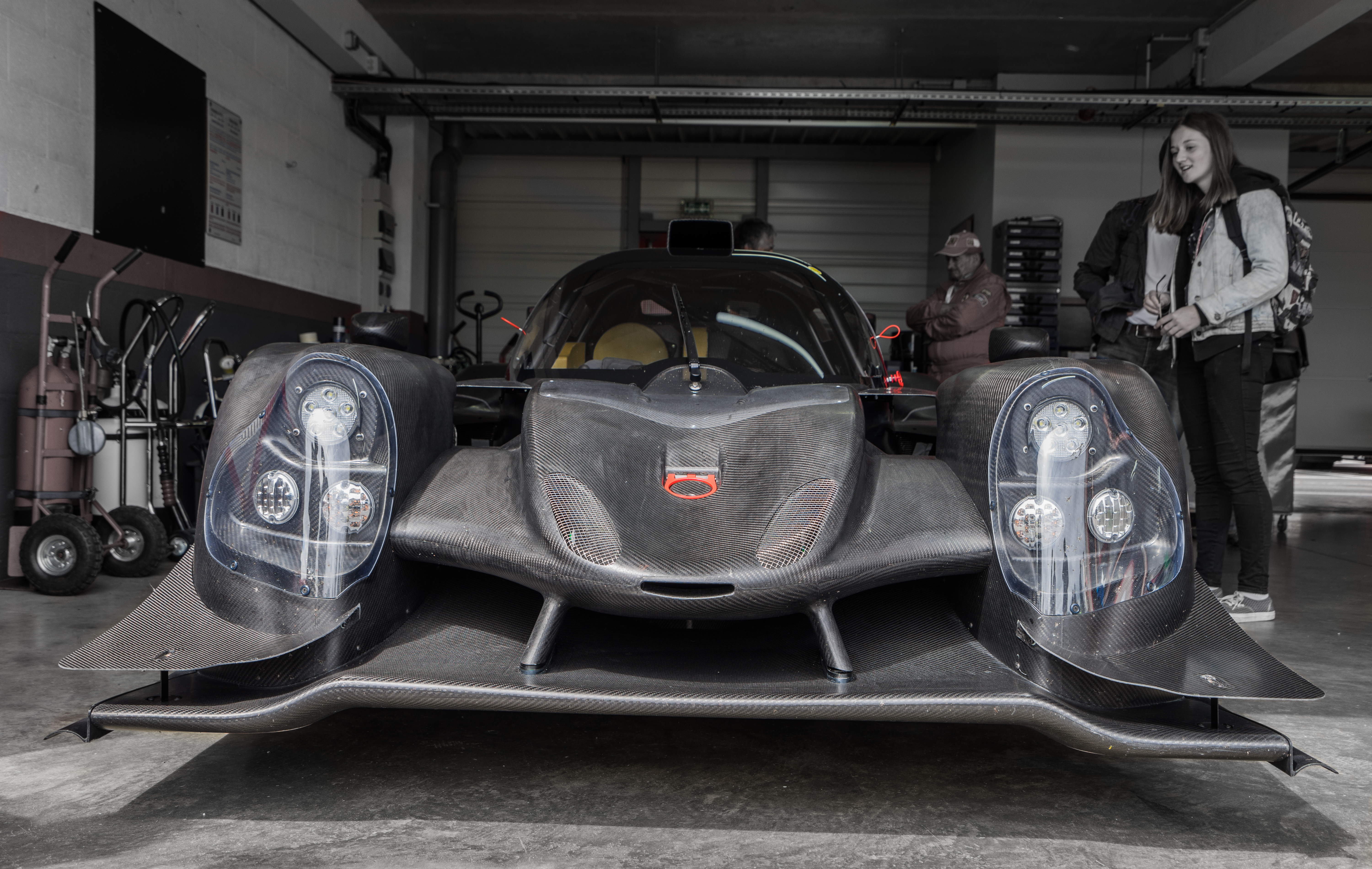 Fabriqué par OnRoak Automotive. V8 Nissan 420cv 22e Sport et Collection/500 Ferrari contre le cancer 2016